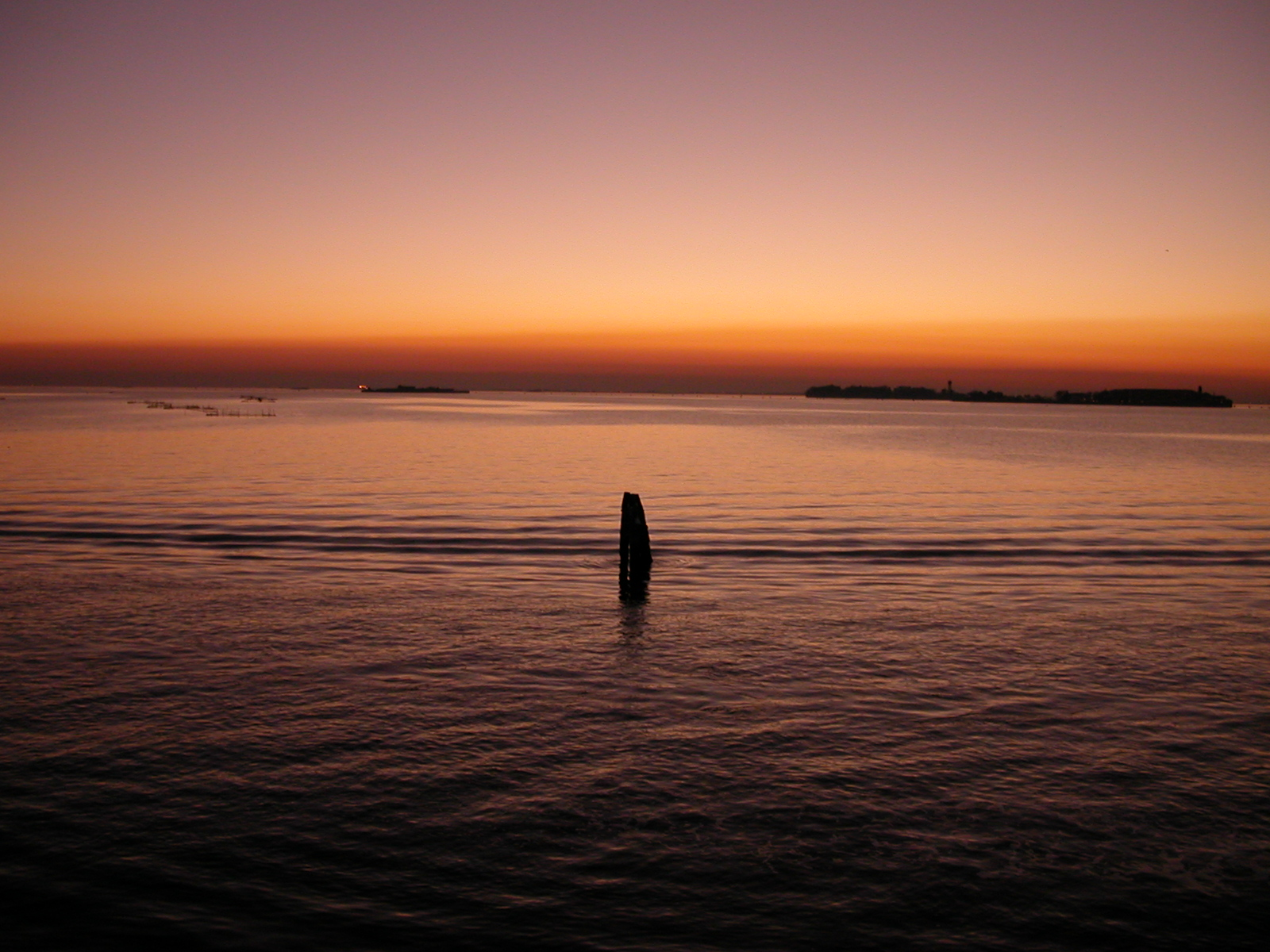 Laguna di Venezia - Tramonto dall'isola di San Servolo (Santo Spirito e Sacca Sessola/San Clemente)